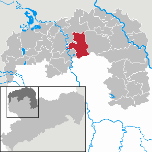 Doberschütz in Saxony - Landkreis Nordsachsen